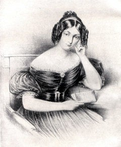 Jenny von Gustedt, nee Jenny Rabe von Pappenheim (1811-1890), german author, illegitime daughter of king Jerôme Bonaparte and Dina von Pappenheim